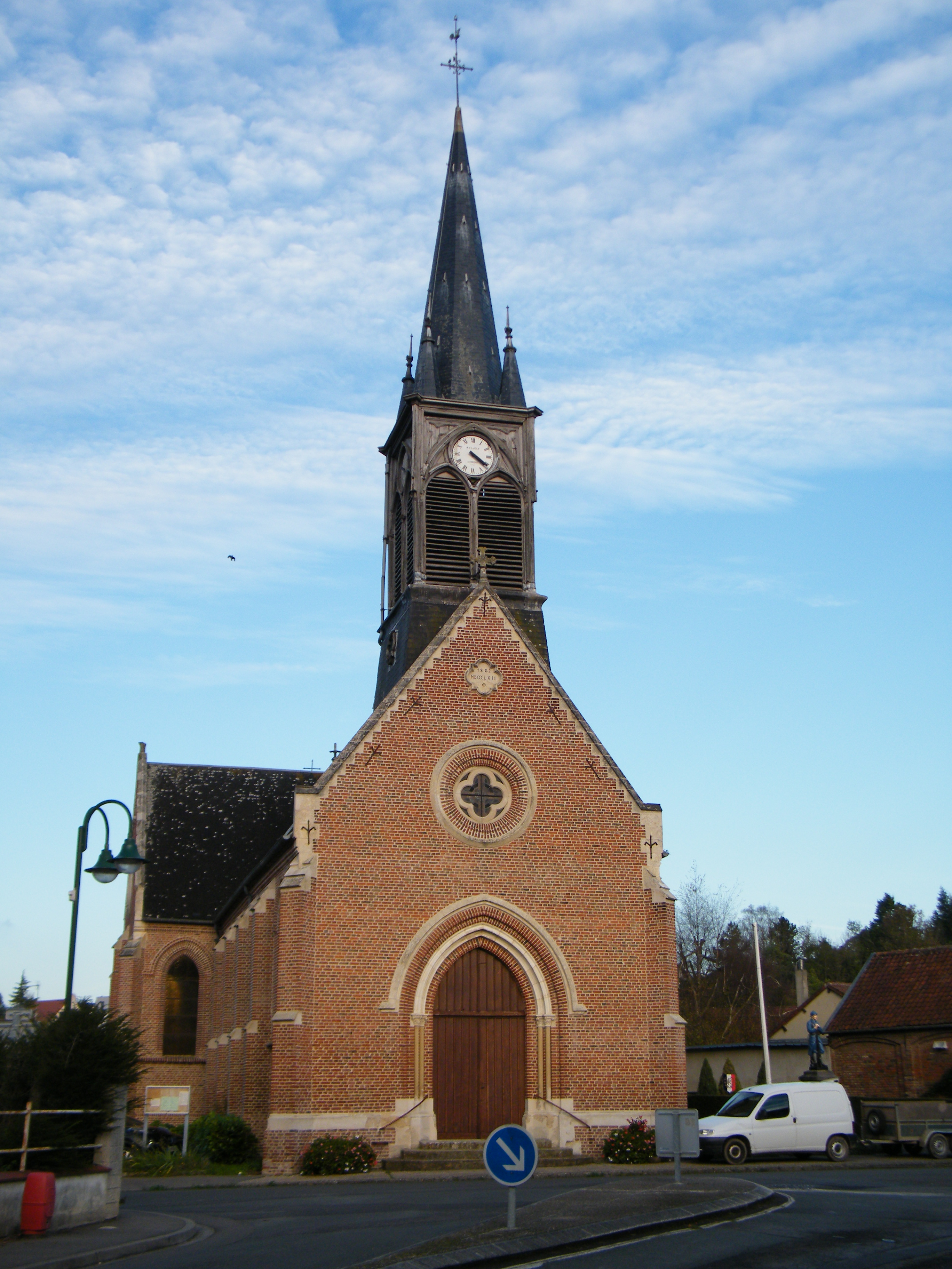 L'église.